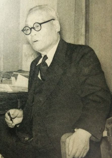 下中弥三郎